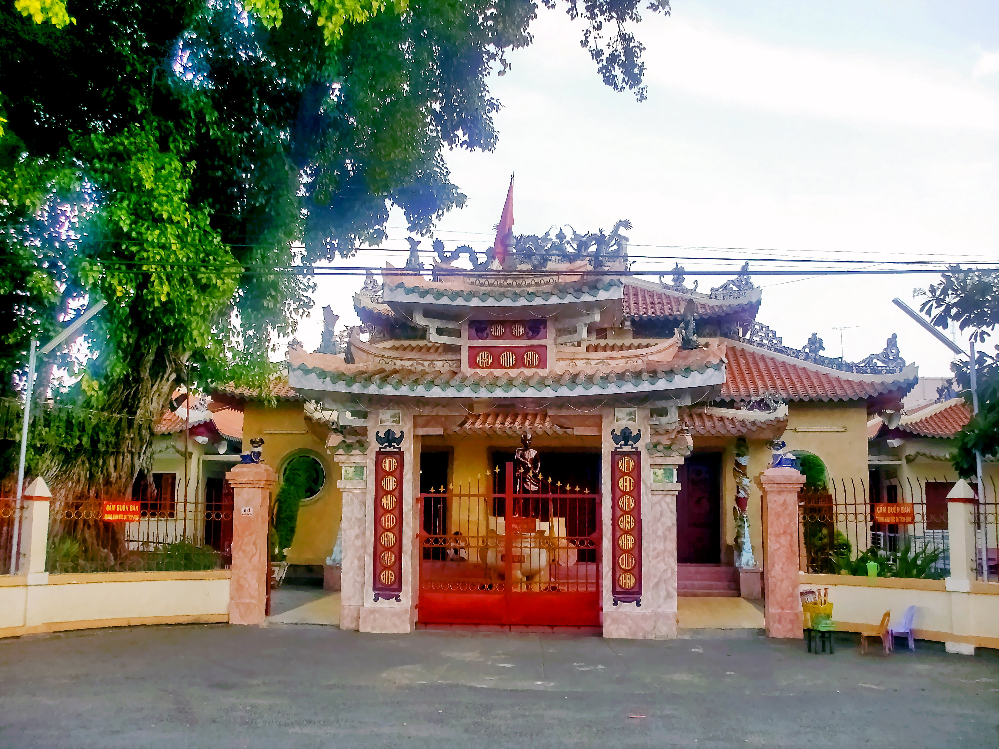 Đền thờ Nguyễn Trung Trực tại TP. Rạch Giá, tỉnh Kiên Gaing, Việt Nam.